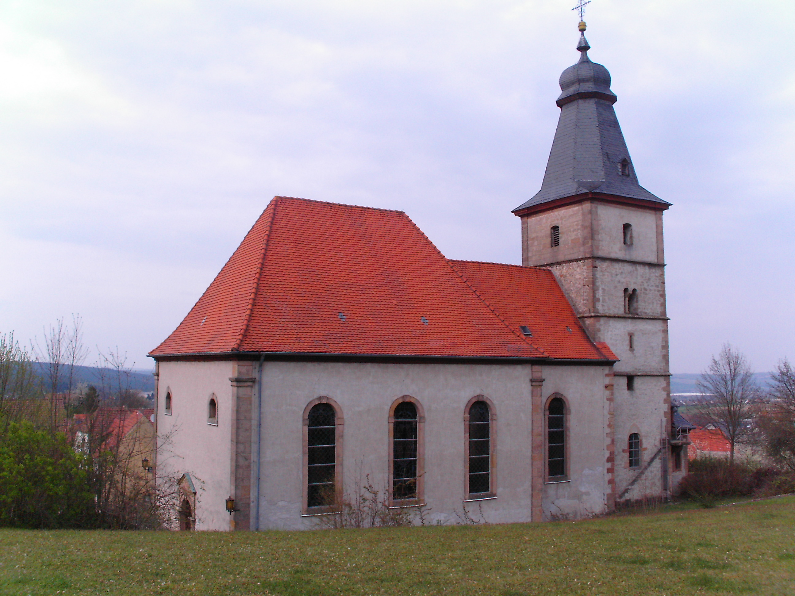 Protestantische Kirche Wattenheim (Pfalz), früher Simultankirche